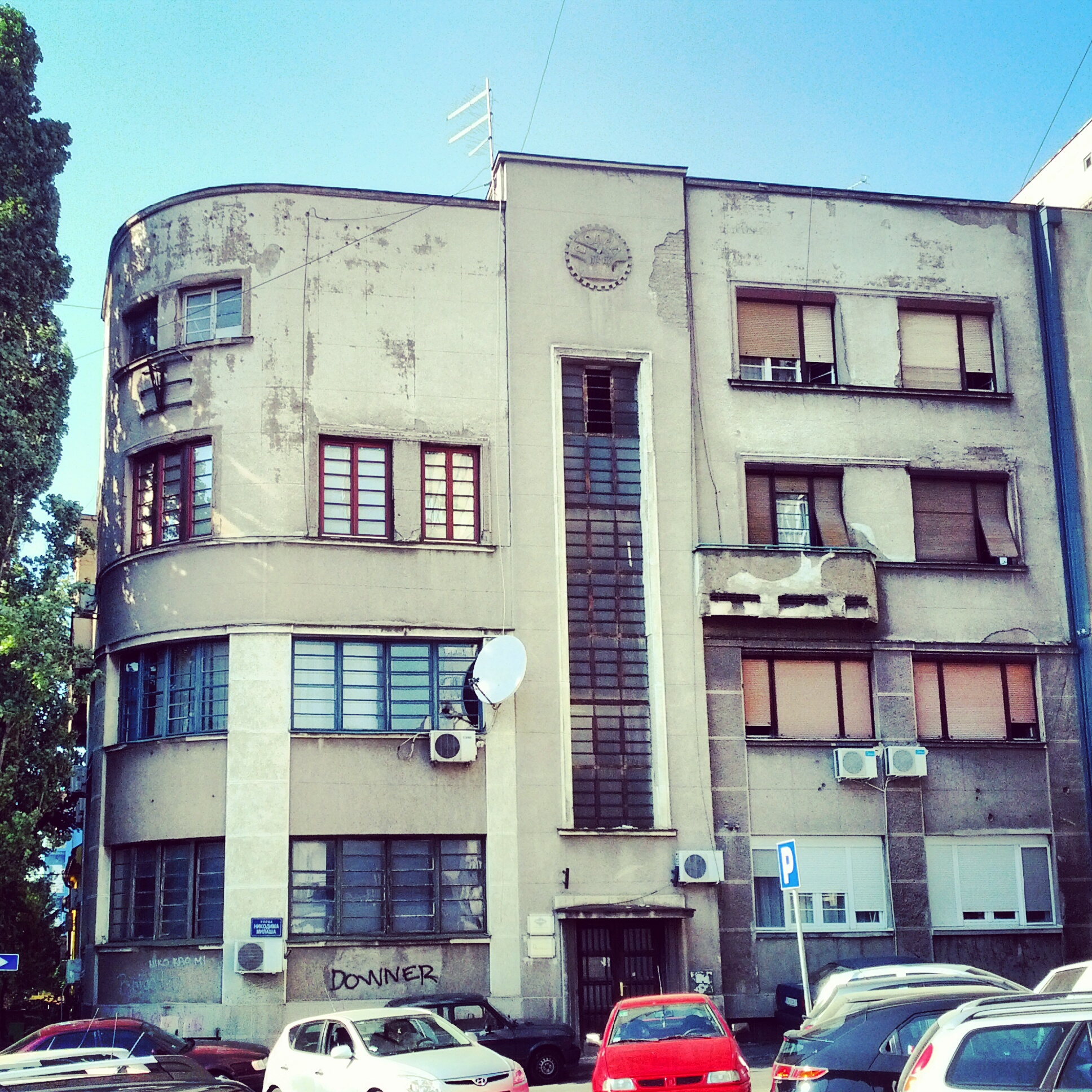 Пословно-стамбена зграда Петра Јанковића